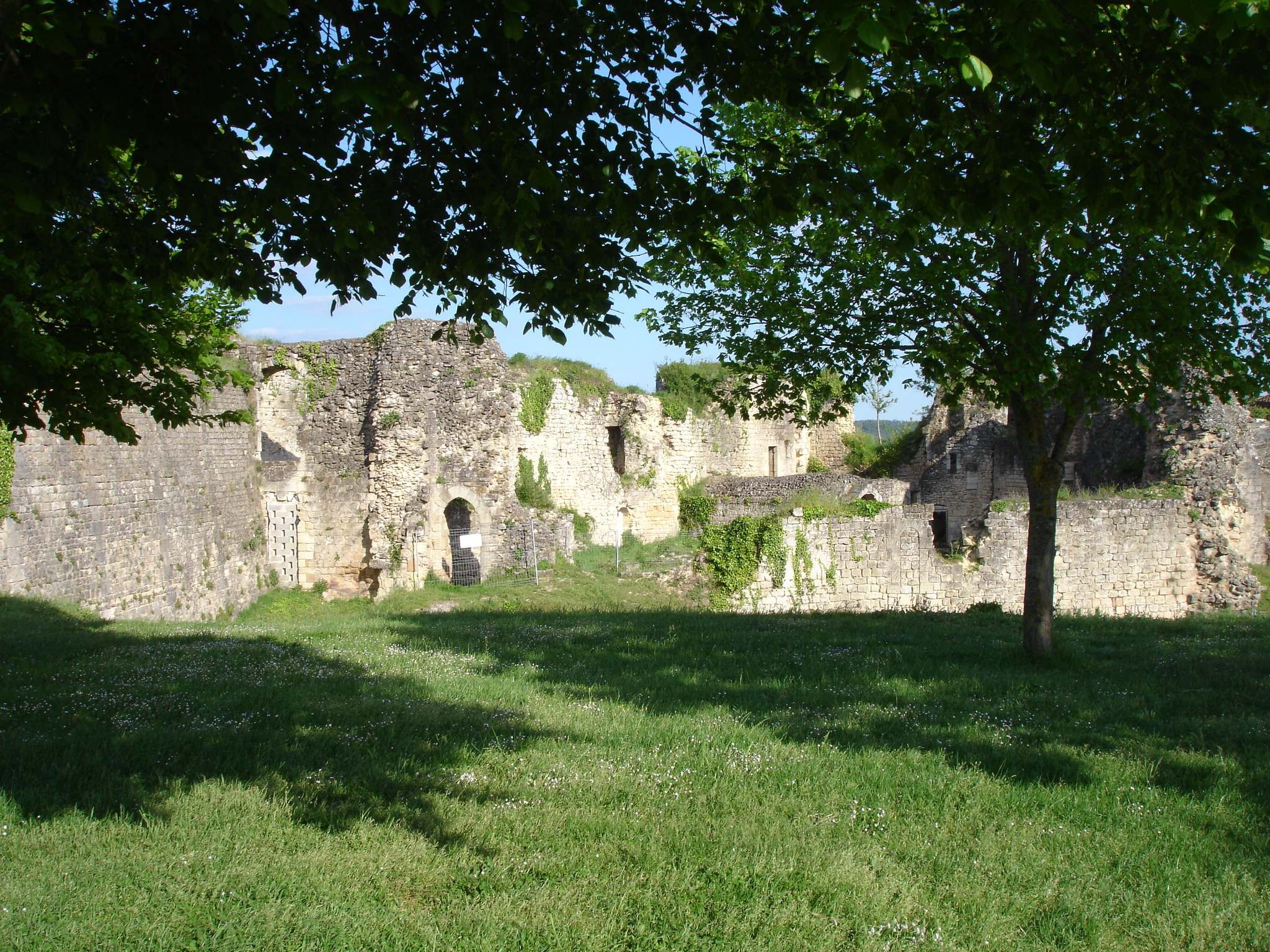 Citadelle de Blaye, Gironde (33), France